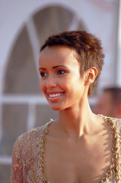 Sonia Rolland au festival de Deauville